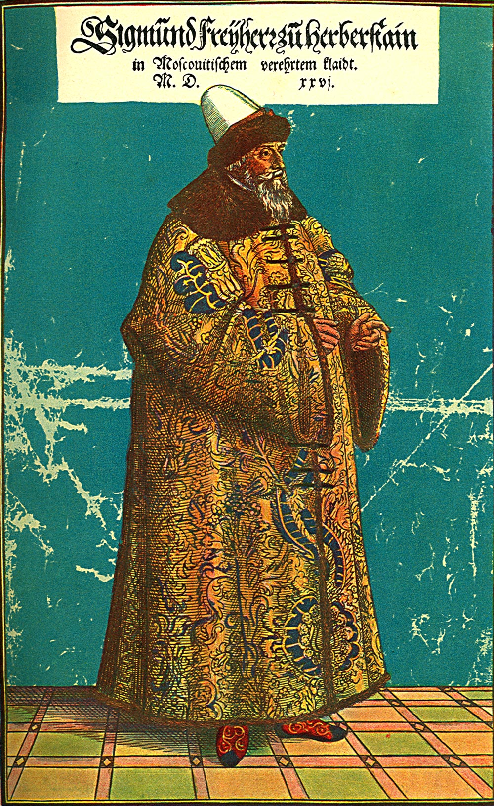 Sigismund von Herberstein Герберштейн в жалованном русском платье, полученном им при втором посольстве (с рисунка того времени) // Сигизмунд Герберштейн. Записки о Московитских делах. - СПб., 1908.